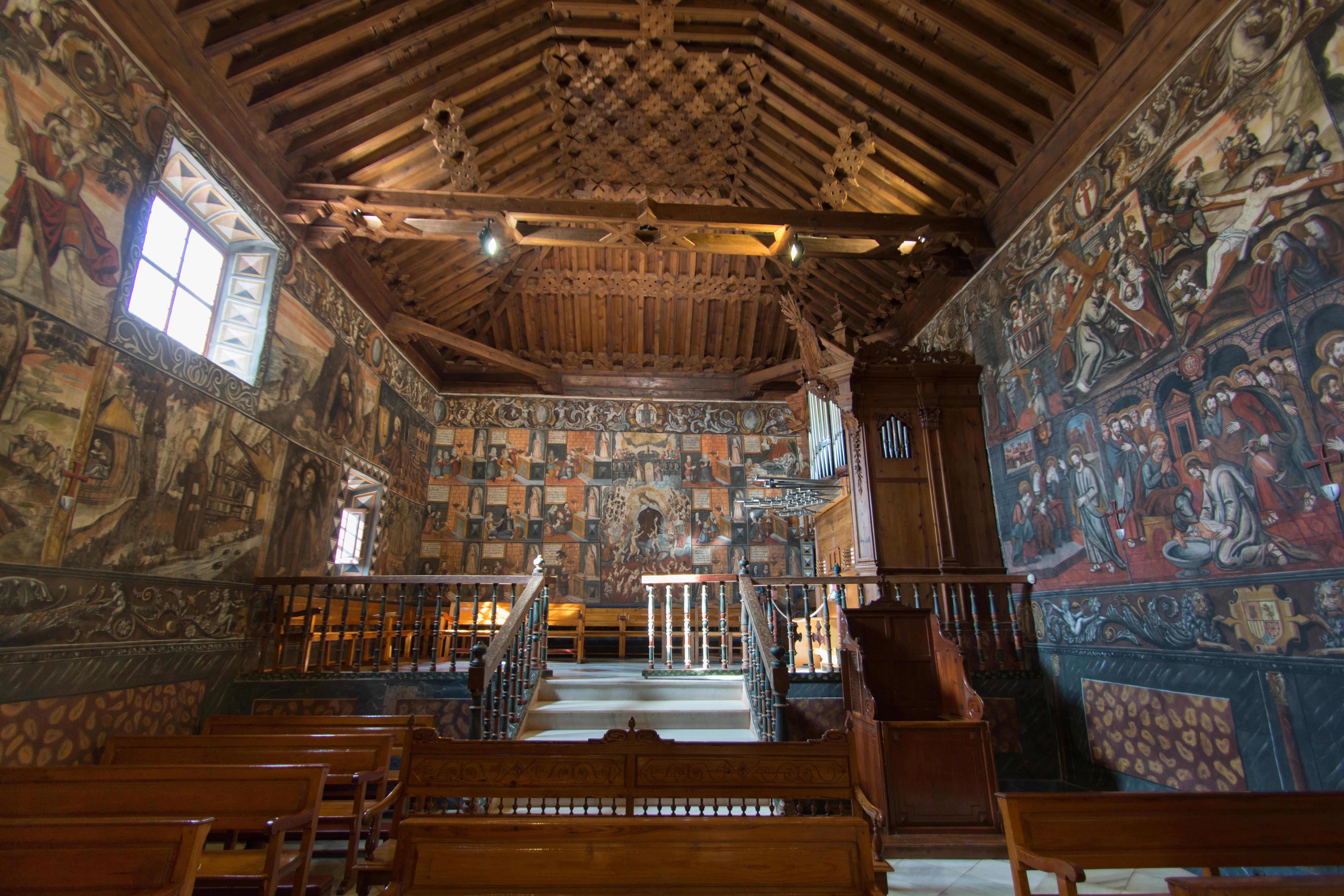 Órgano de la Iglesia de Santa Eulalia de Merida